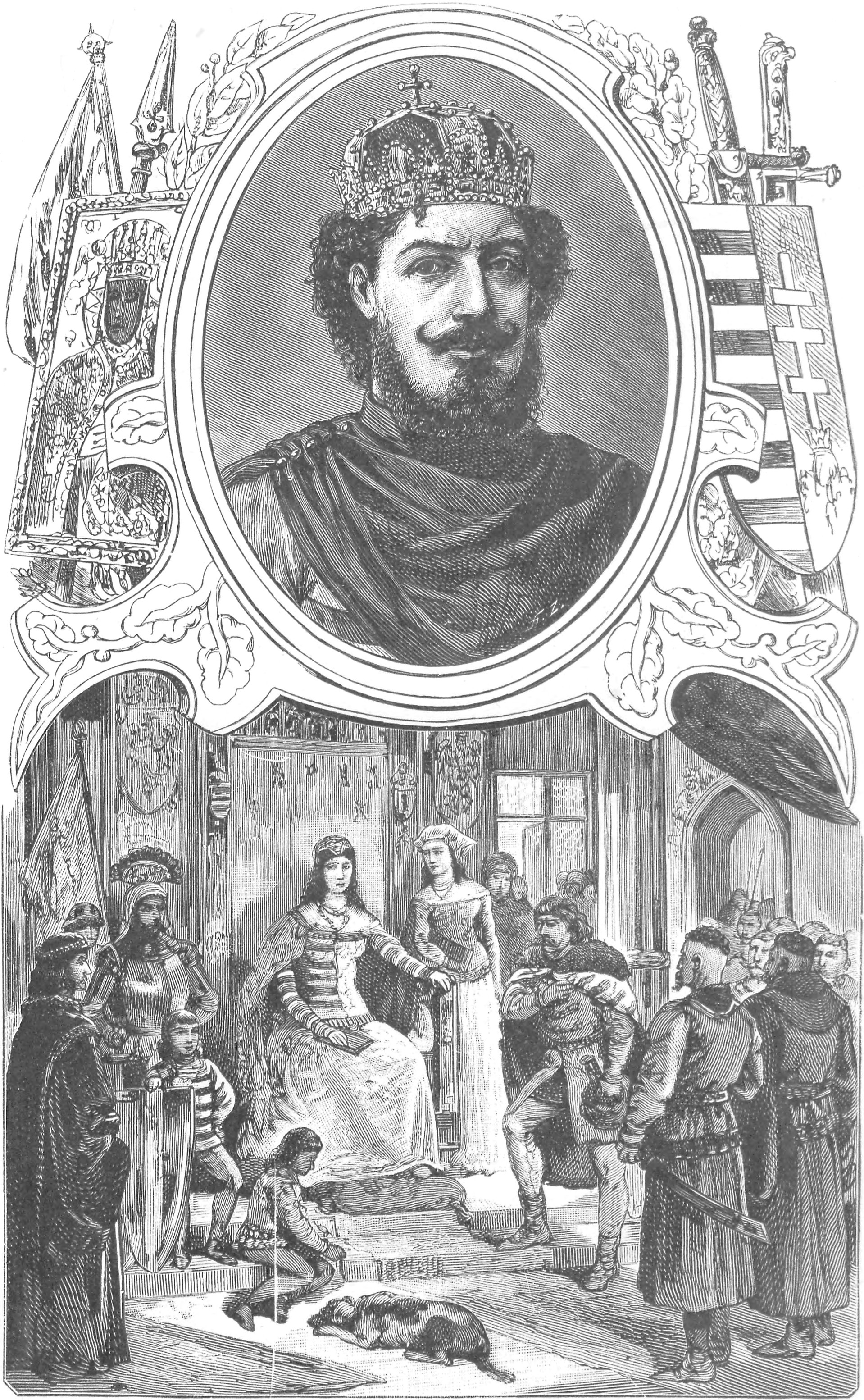 ilustracja z książki „Wizerunki książąt i królów polskich“